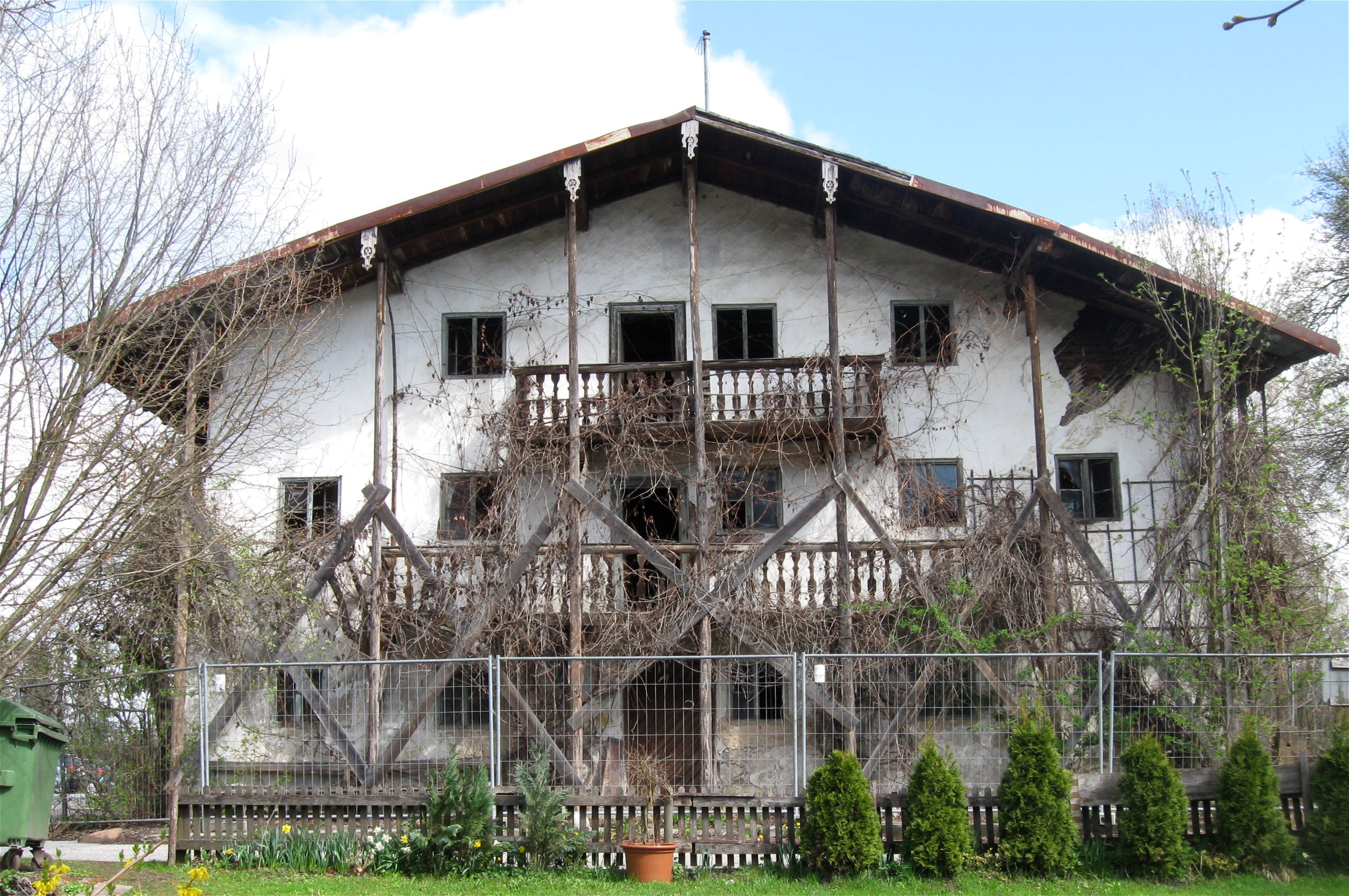 Florianistraße 3; Bauernhaus, verputzter Obergeschoss-Blockbau mit zwei Lauben, erbaut 1746. Zustand April 2012: Verfallend, unbewohnt.